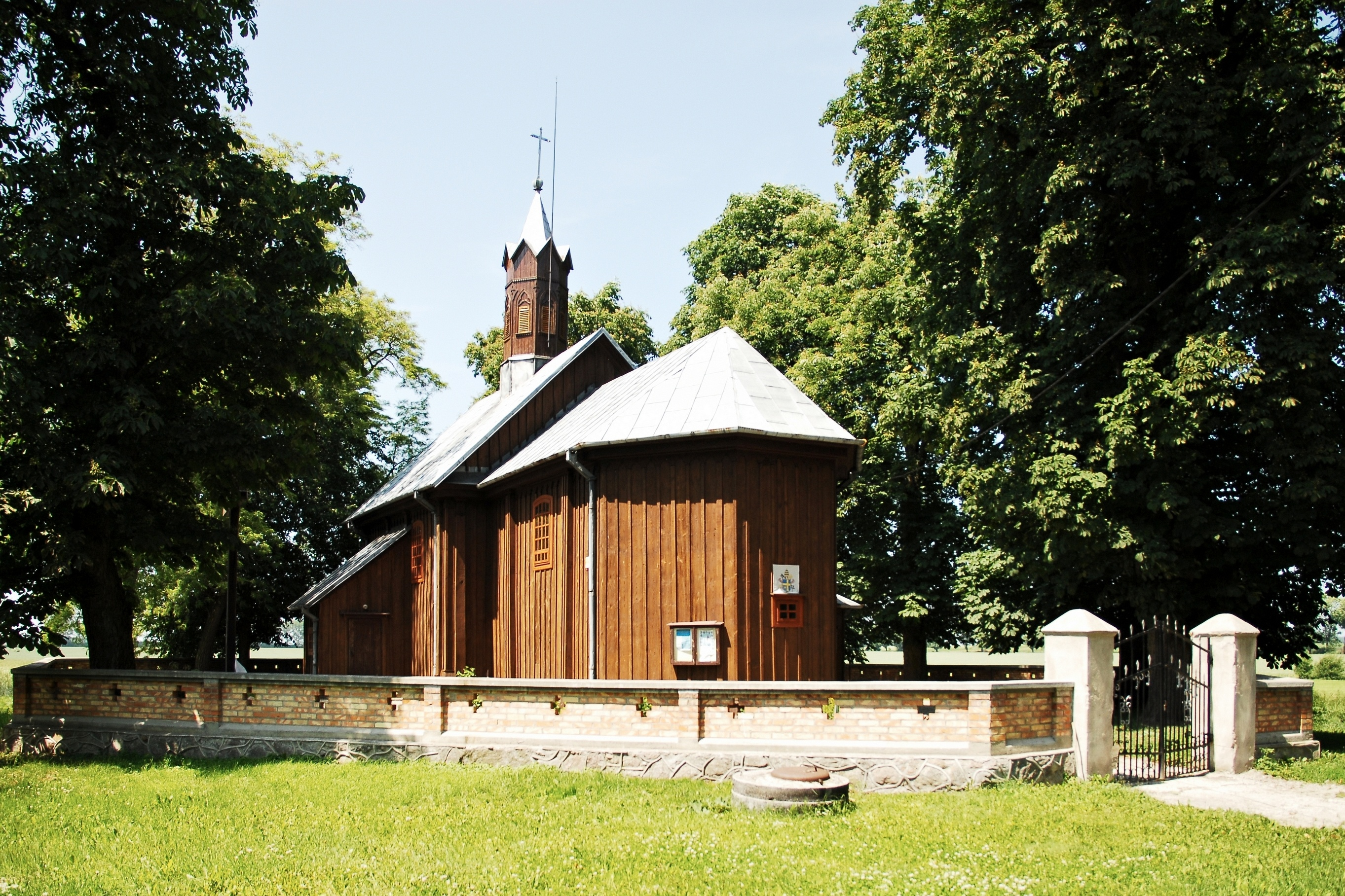 Kościół pw. św. Marii Magdaleny w Pilichowie (województwo mazowieckie).